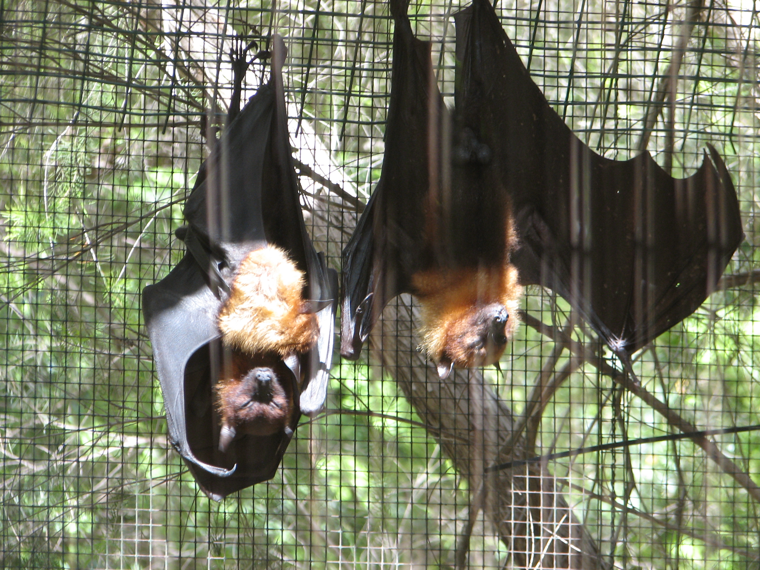 The Lyle's Flying Fox (Pteropus lylei) is a species of bat in the Pteropodidae family. It is found in Cambodia, Thailand, and Vietnam. עטלף השועל המעופף, עטלף צמחוני. חי בקמבודיה, ויטנאם ותאילנד בספארי ברמת גן טירת כרמל היא עיר במחוז חיפה בישראל ממוקמת במורדות המערביים של הר הכרמל בין שכונת דניה בחיפה לכפר גלים, בסמוך לכביש 4, הכביש הישן מחיפה לתל אביב.